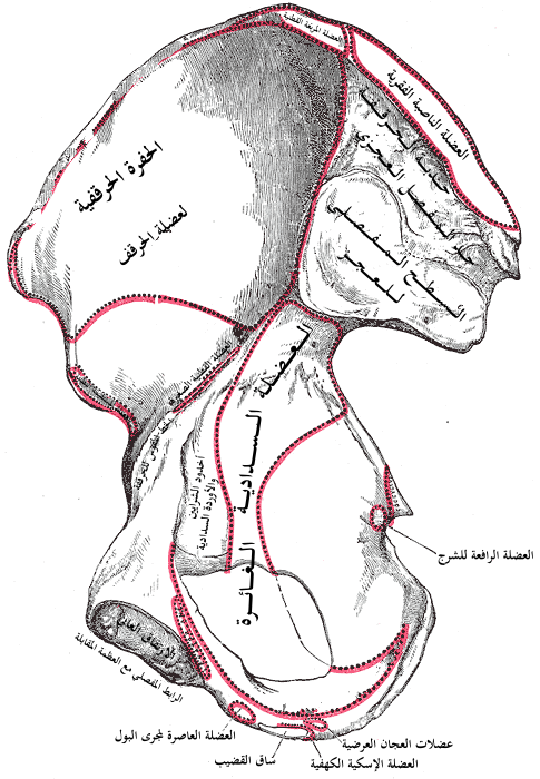 السطح الداخلي لِعظم الحوض الأيمن عند الإنسان.